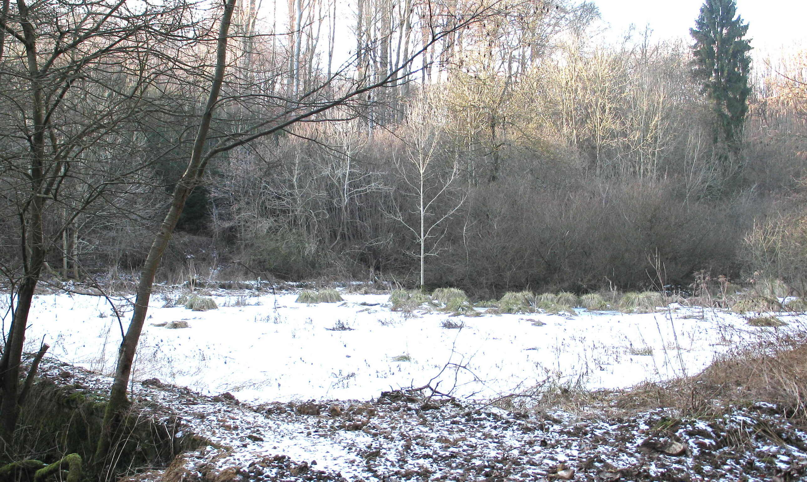 Den zougefruerene Weier vum Schlass Saint Hubert am Birelegronn